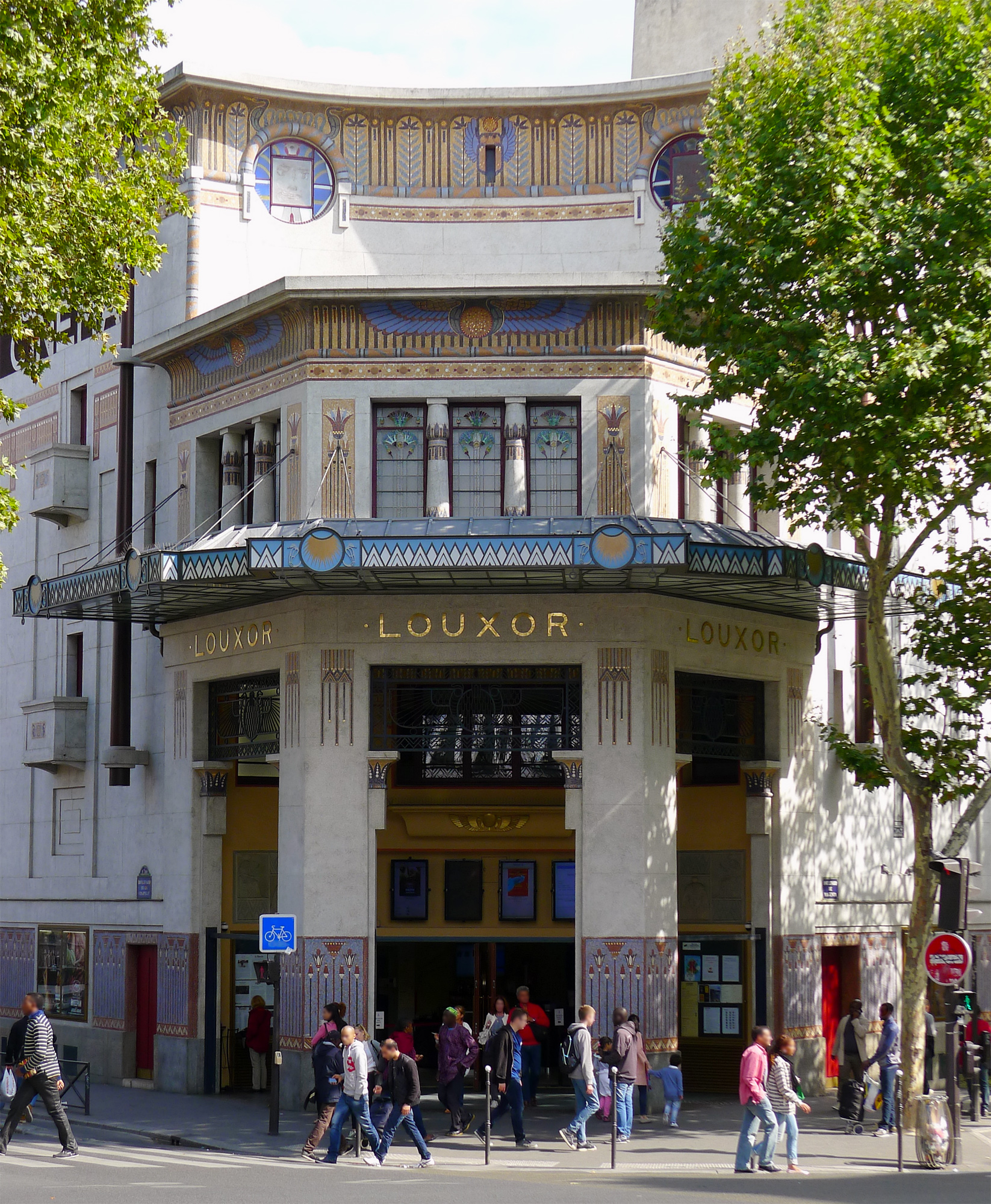 "Le Louxor", à l'angle du boulevard de Magenta (n°170) et du boulevard de la Chapelle - Paris X